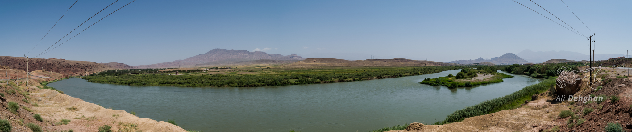 نمای پانوراما